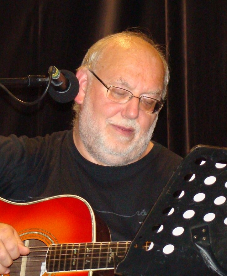 Jan Nedvěd